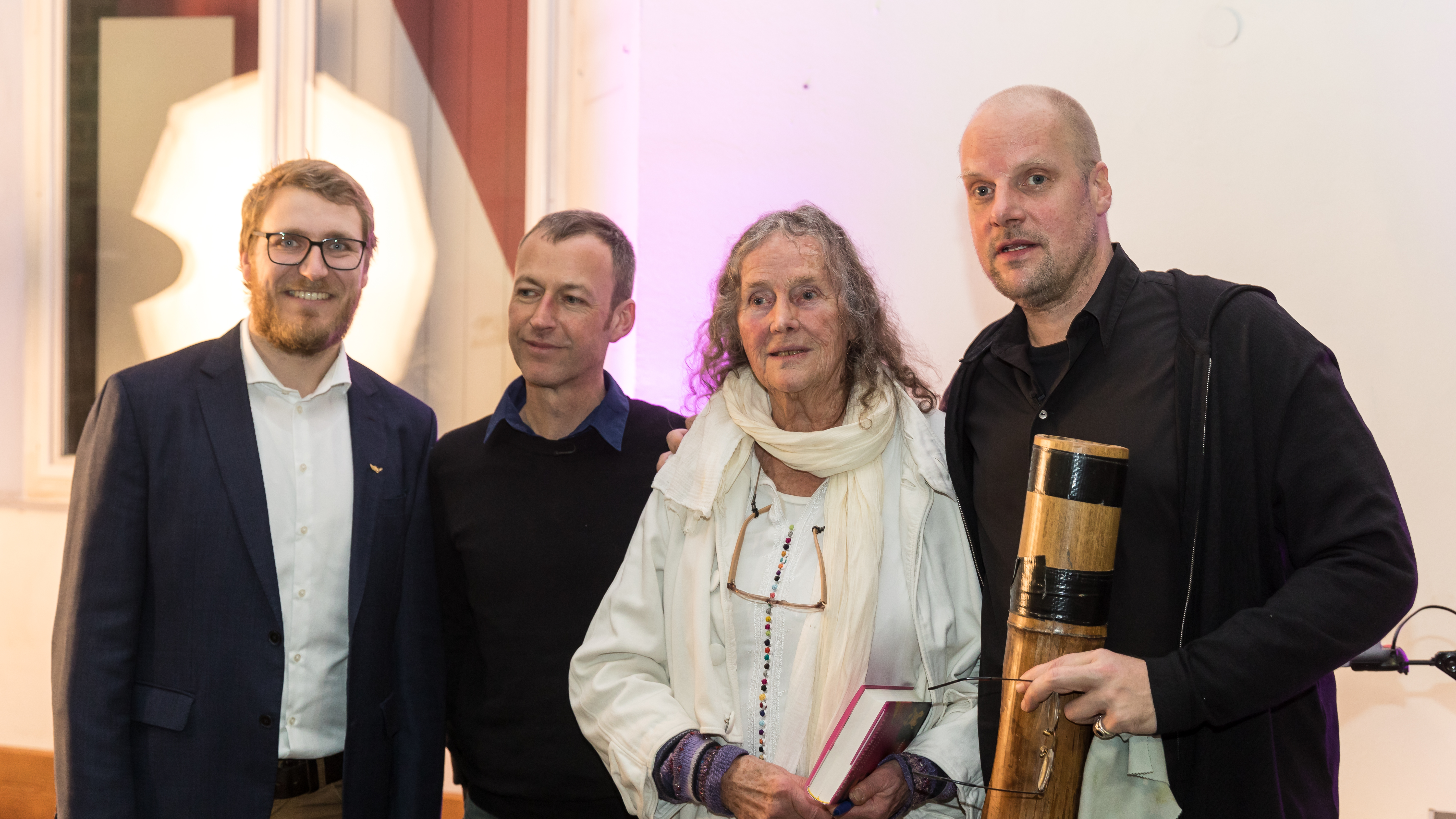 Ein Abend mit der „Mutter“ der Fluxus-Bewegung Mary Bauermeister. Im Rahmen der Sonderausstellung „KÖLN 68! Protest. Pop. Provokation.“ traten Mary Bauermeister und ihr Sohn Simon Stockhausen gemeinsam auf die Bühne. Mit dabei auch der Künstler Gregor Zootzky mit seinem Zeichentrick-Kurzfilm „Psst pp Piano – Hommage à Mary Bauermeister“.